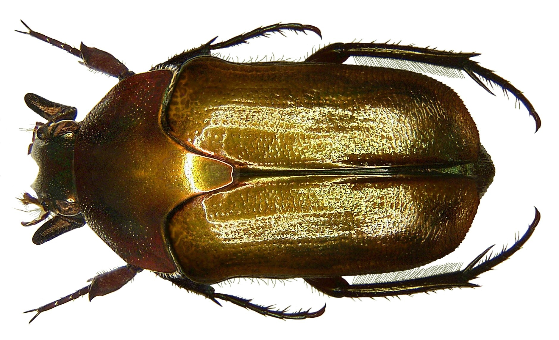 Familie: Scarabaeidae Größe: 23,7-27,4 mm Verbreitung: Papua Neuguinea Fundort: West-Papua, Mokwam leg. A.Weigel, 2007; det. U.Schmidt, 2008 Foto: U.Schmidt, 2008